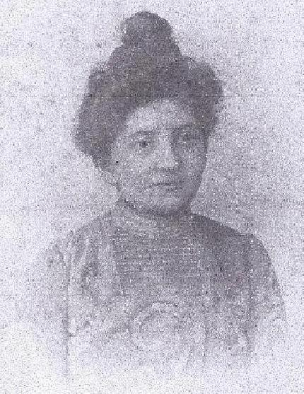 שולמית רופין